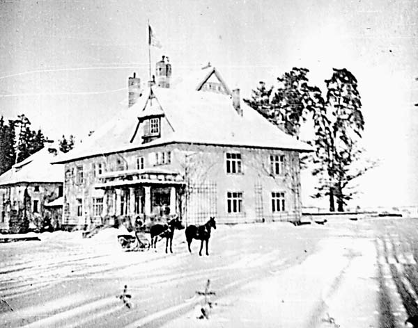 Беларуская (тарашкевіца): Варапаева (Varapajeva), сядзіба Празьдзецкіх (Praździecki)